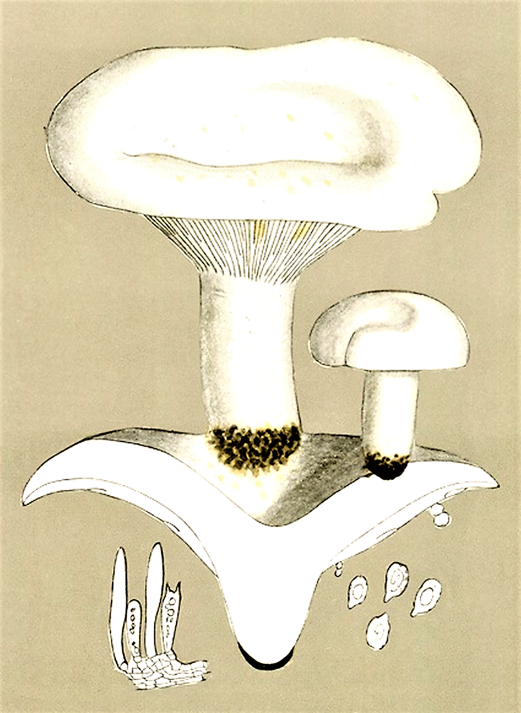 Giacomo Bresadola: Lactarius piperatus Pers. (?)